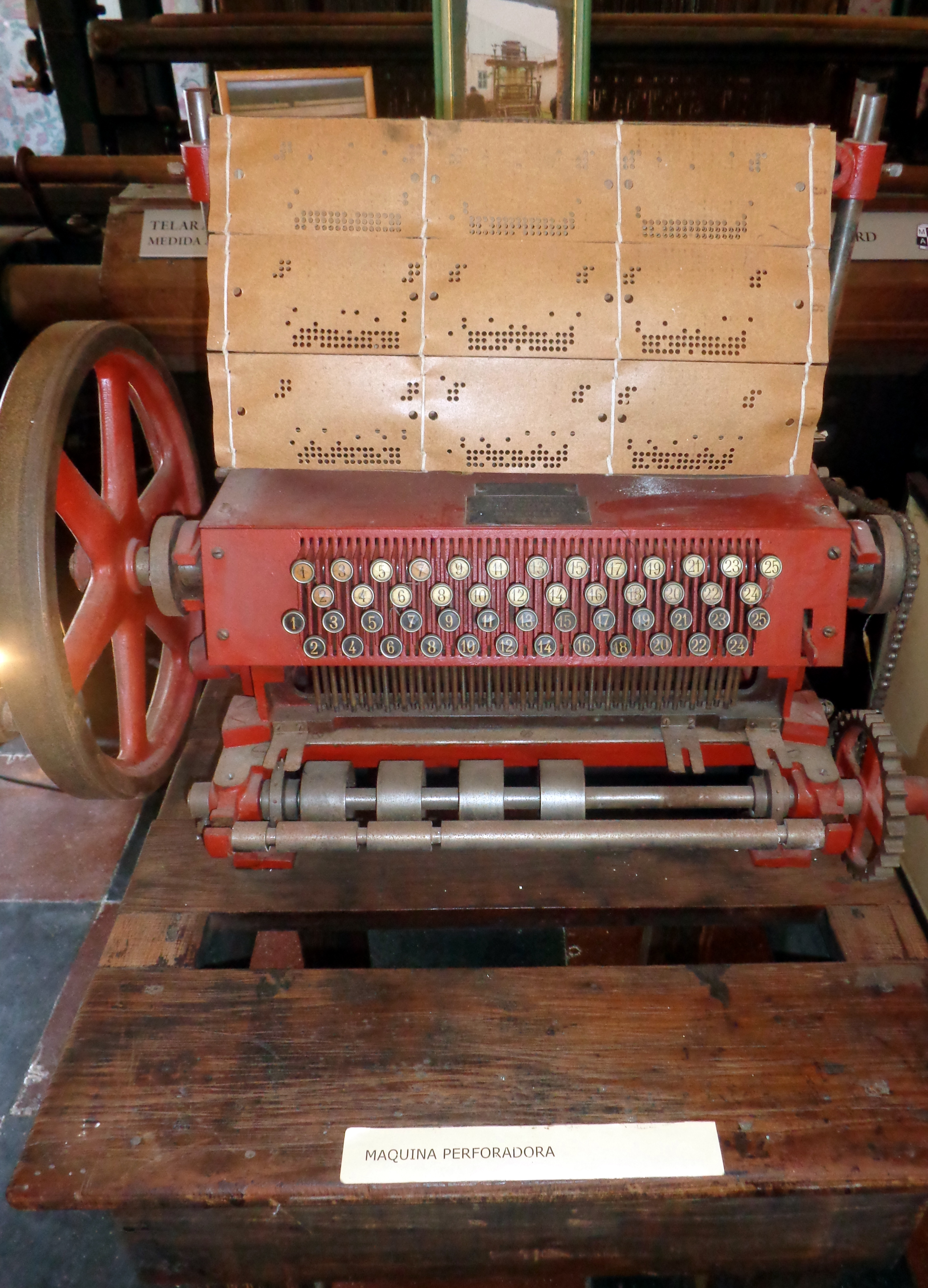 Museo y archivo textil Algoselan Flandria en Parque Industrial Villa Flandria, José María Jauregui, Luján, Provincia de Buenos Aires, Argentina